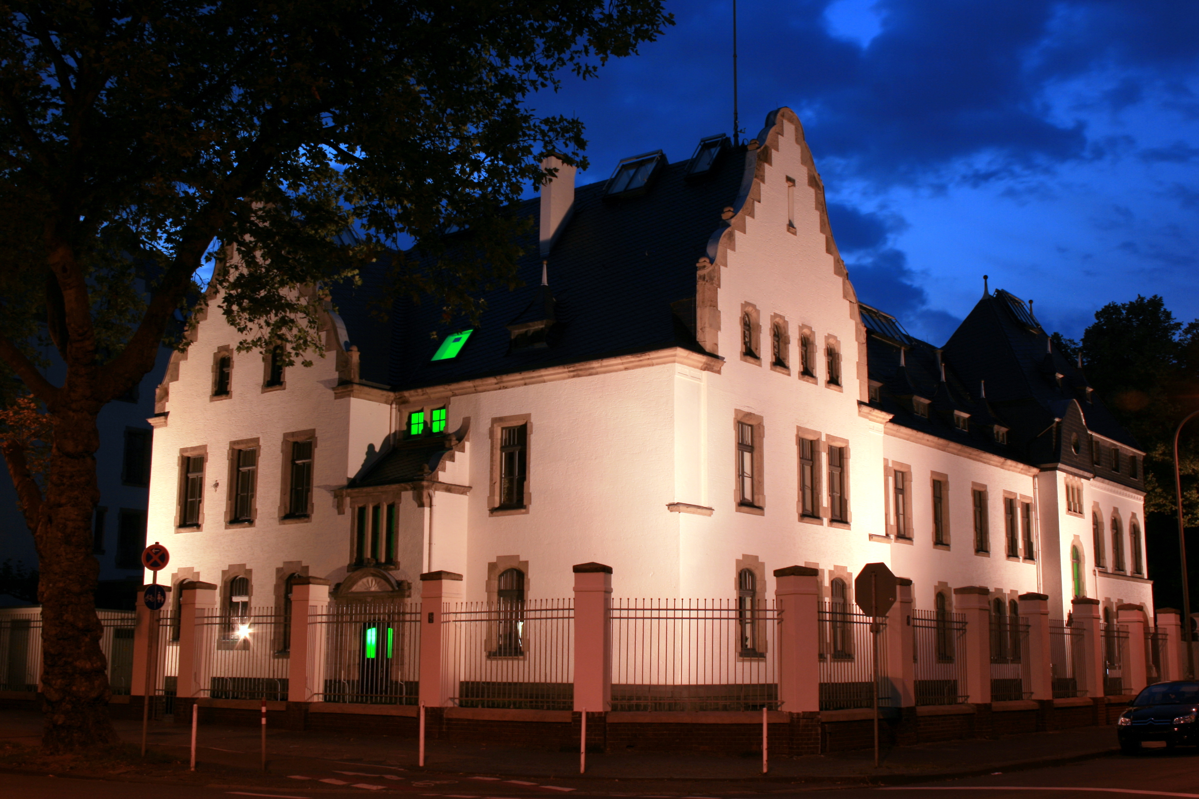 Süd-Ost-Ansicht der ehemaligen Husarenkaserne in Krefeld, heute Sitz des Sport- und Bäderamtes und des Stadtsportbundes.